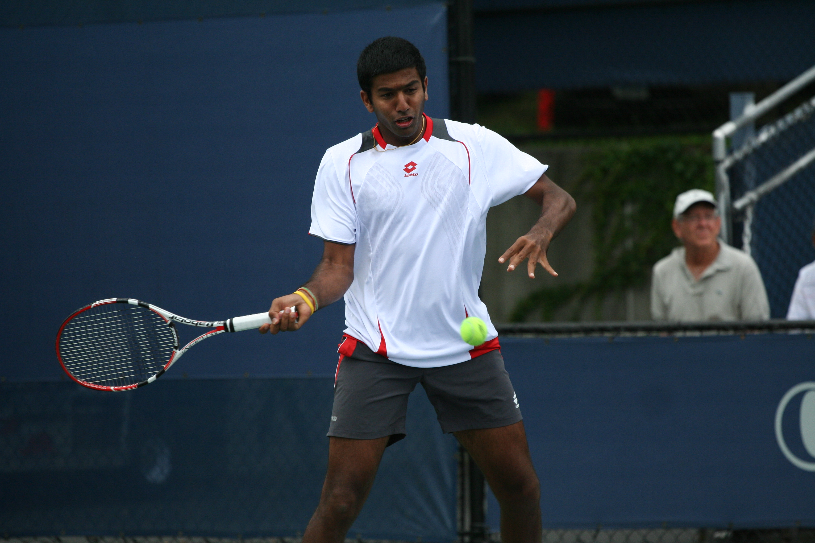 U.S. Open Sept. 3, 2010